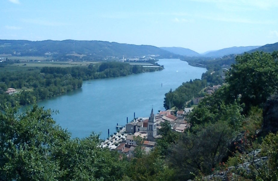 Andance vue générale et détails